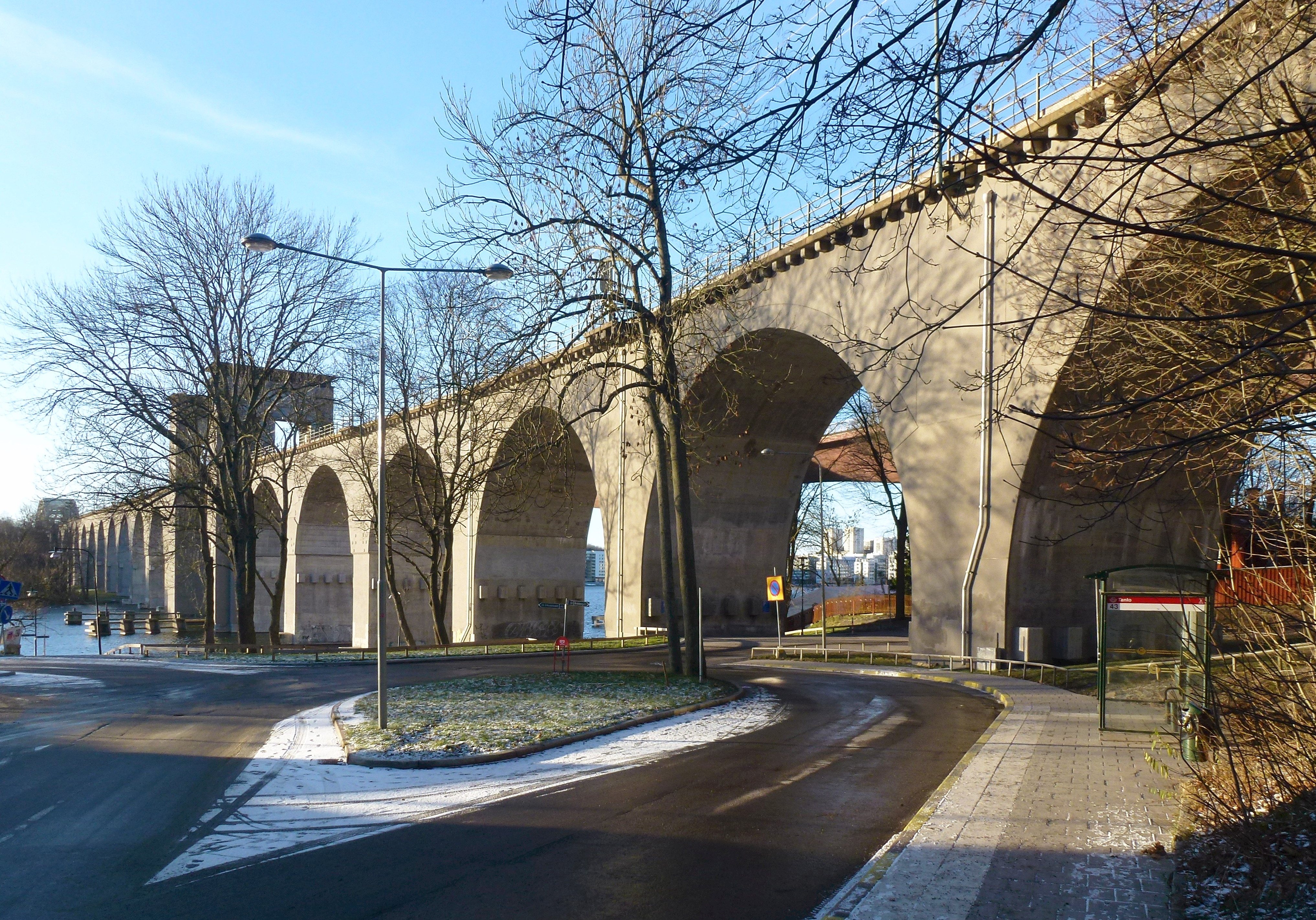 Gamla Årstabron, vy från Tanto